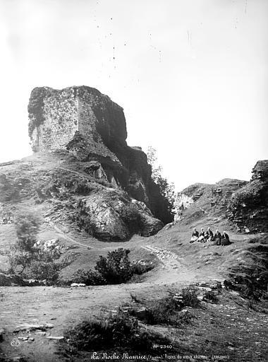 La Roche-Maurice : le donjon (photo de Médéric Mieusement, 1885